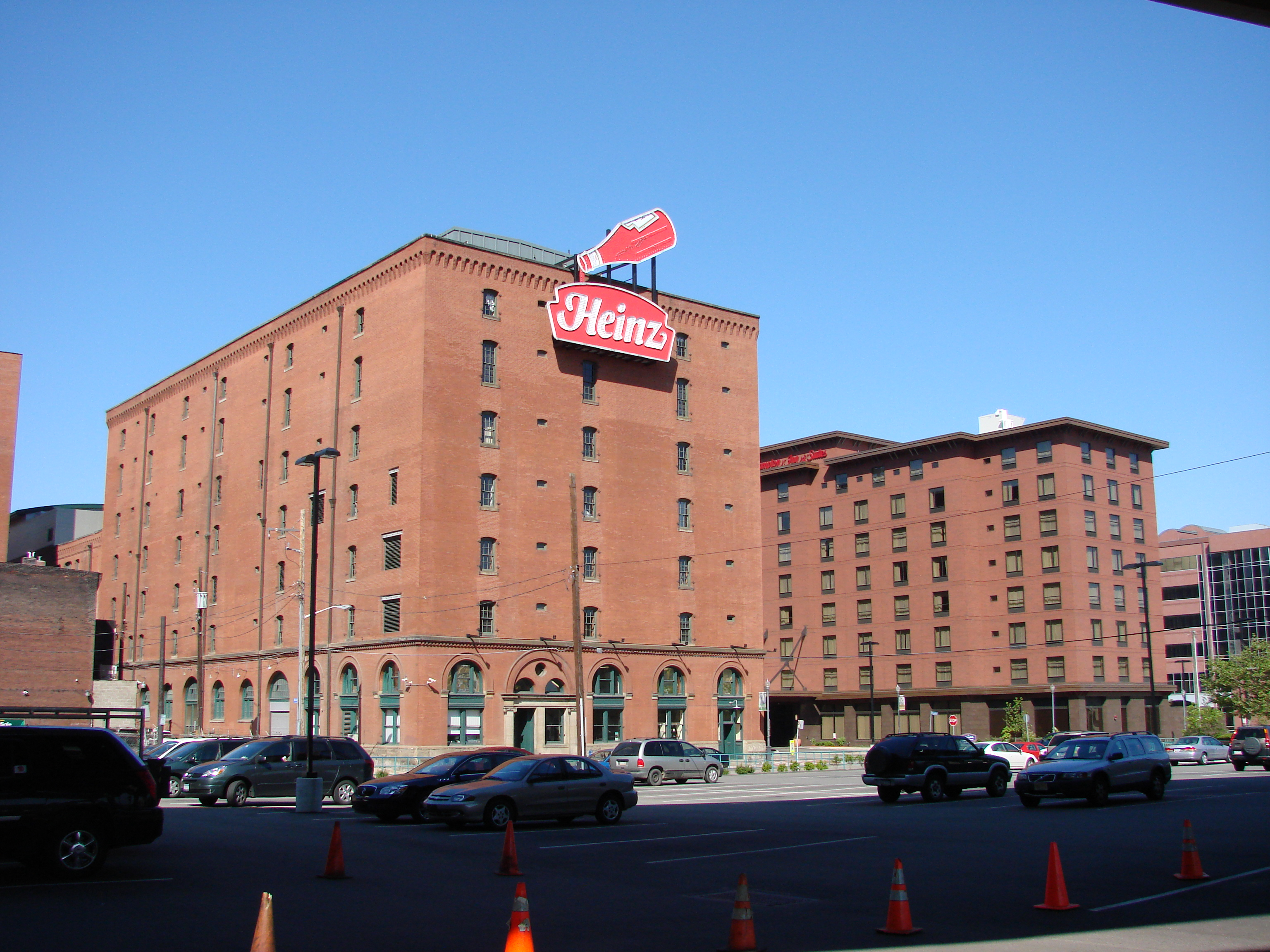 2008-05-24 Pittsburgh 014 Penn St, 13th St, Heinz Building